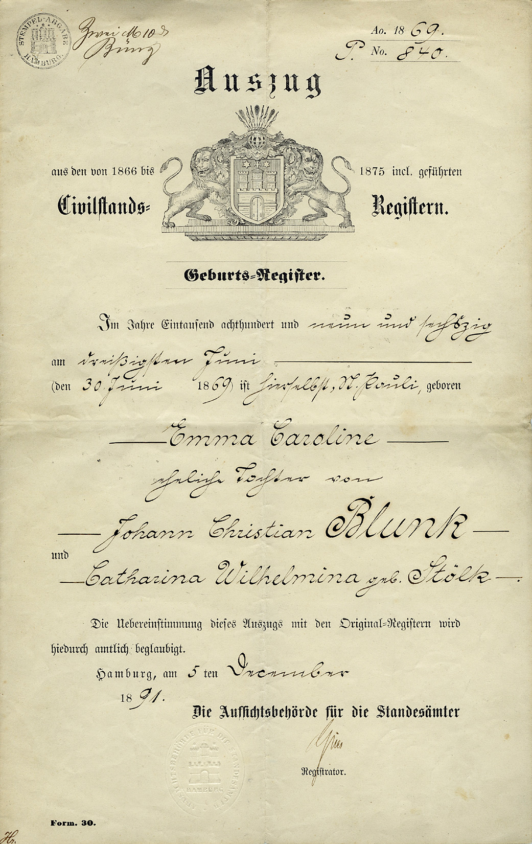 תעודת לידה מגרמניה